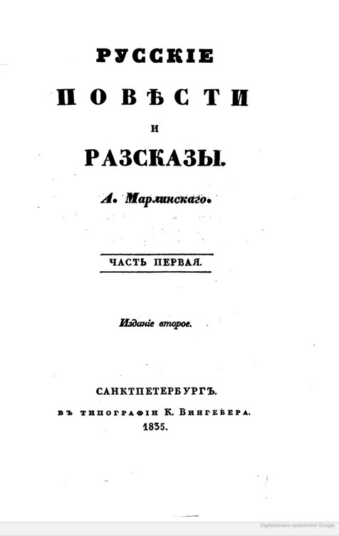 Ruské novely a povídky Bestuževa-Marlinského